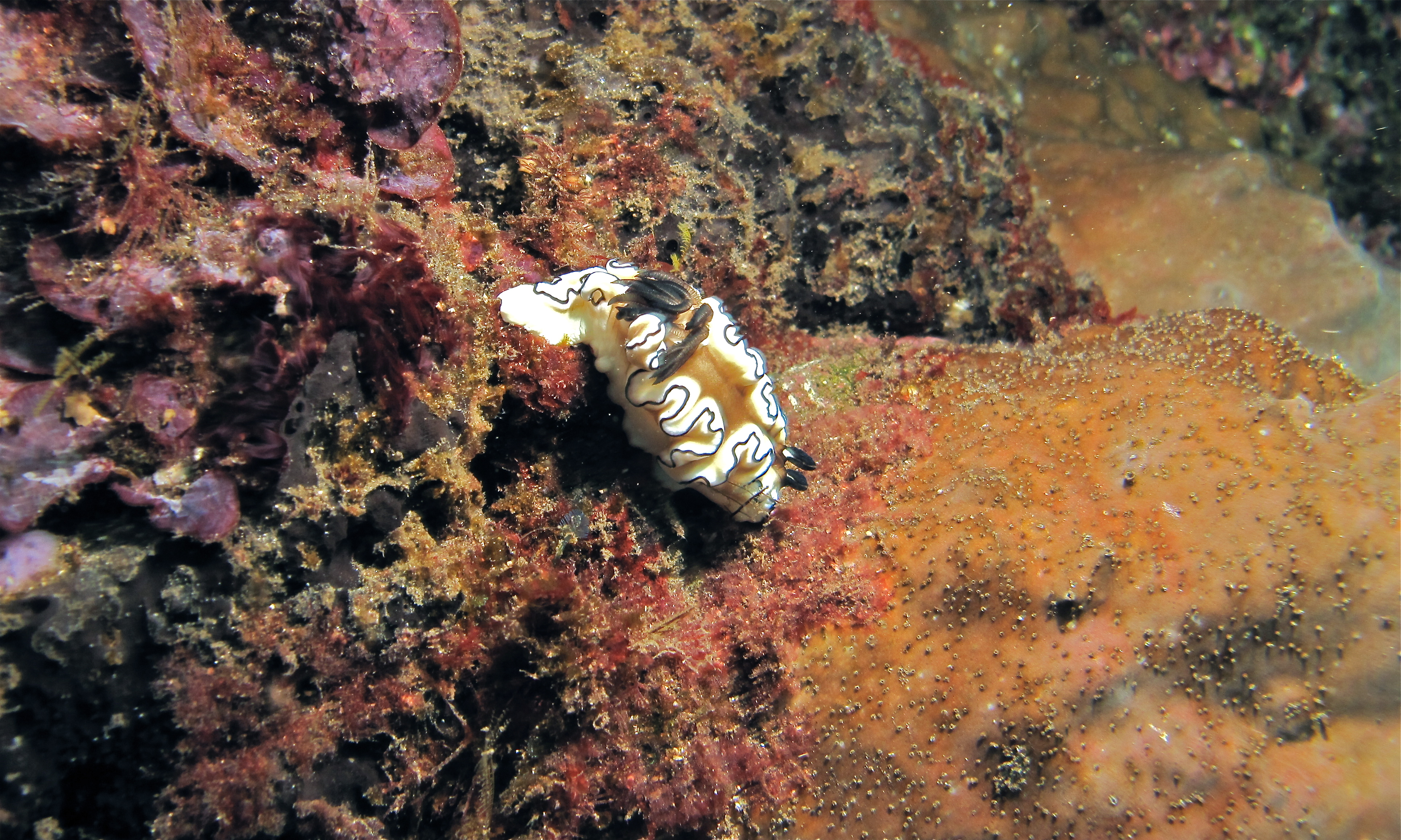 Nudi Retreat II, Lembeh Strait, Sulawesi, INDONESIA